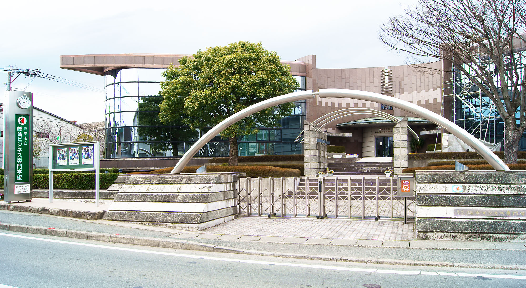 熊本市立総合ビジネス専門学校 外観